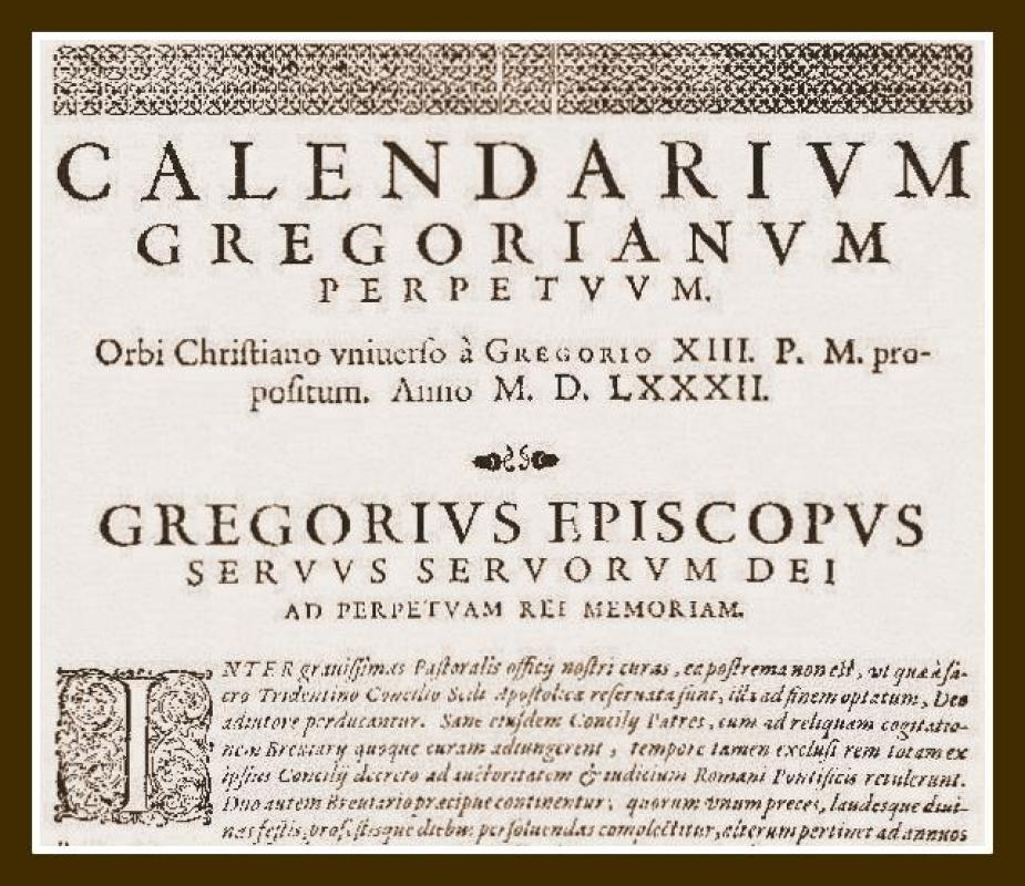 A Gergely-naptárt kihirdető bulla kezdőlapja